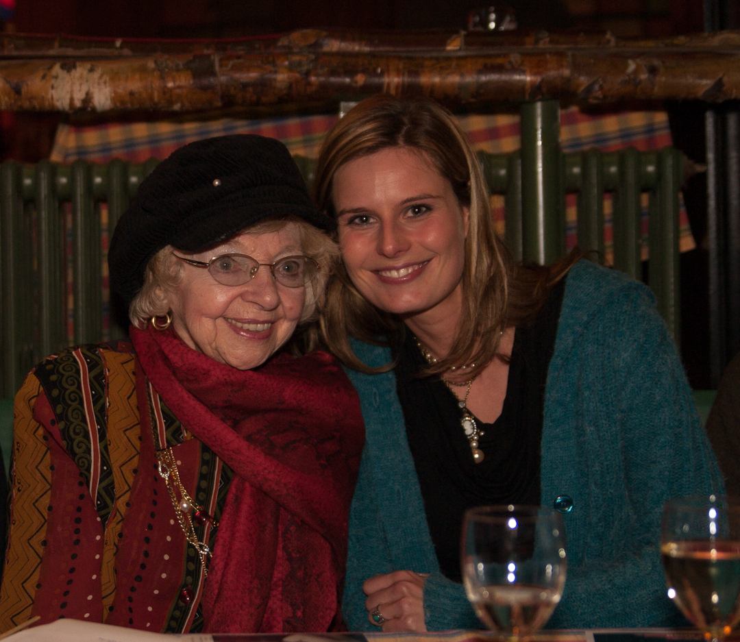 Yvonne Verbeeck & Silvia Claes samen op de foto in Het Witte Paard te Blankenberge tijdens het Glenn Mancini fanbal.